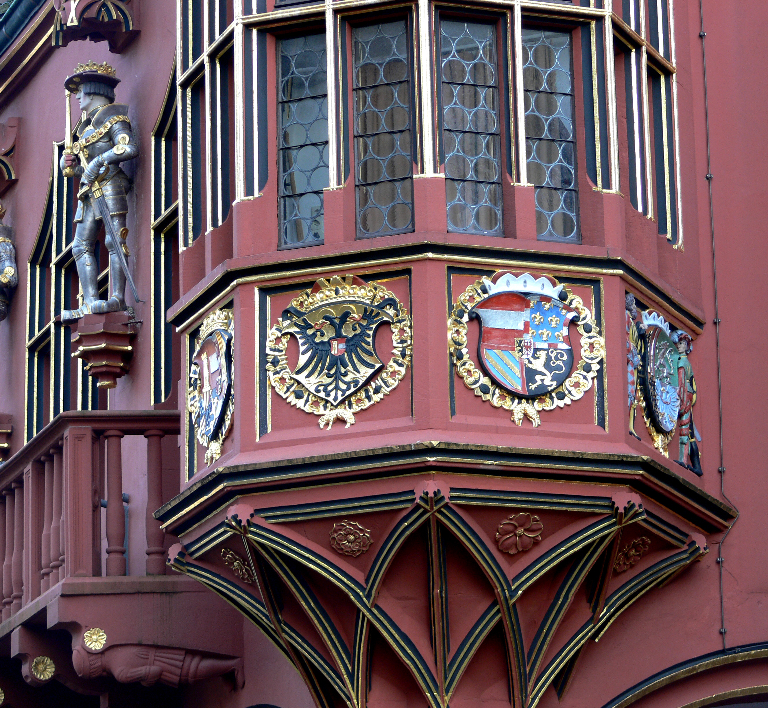 Erker des Historischen Kaufhaus am Münsterplatz, Freiburg im Breisgau